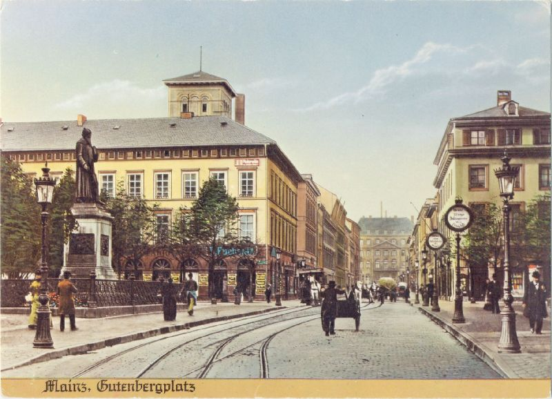 Der Gutenbergplatz in Mainz mit Blickrichtung nach Westen. Es sind Schienen der Mainzer Pferdebahn, die von 1883 bis 1904 verkehrte, zu erkennen. Links befindet sich auf dem Bild das Gutenberg-Denkmal.